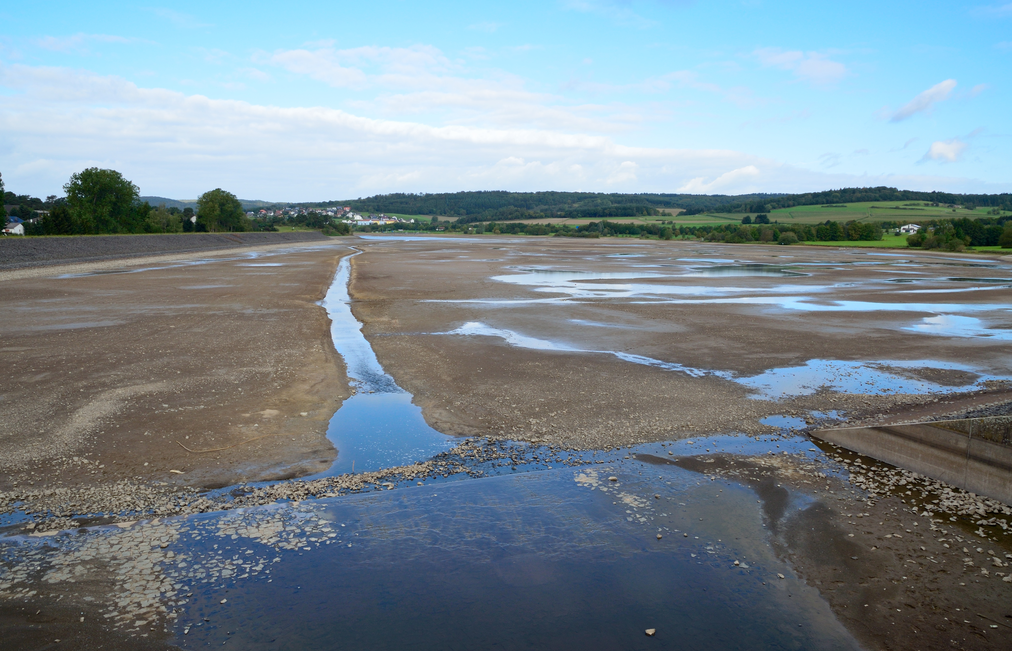 Der Aartalsee (Hauptbecken) bei abgelassenem Wasser